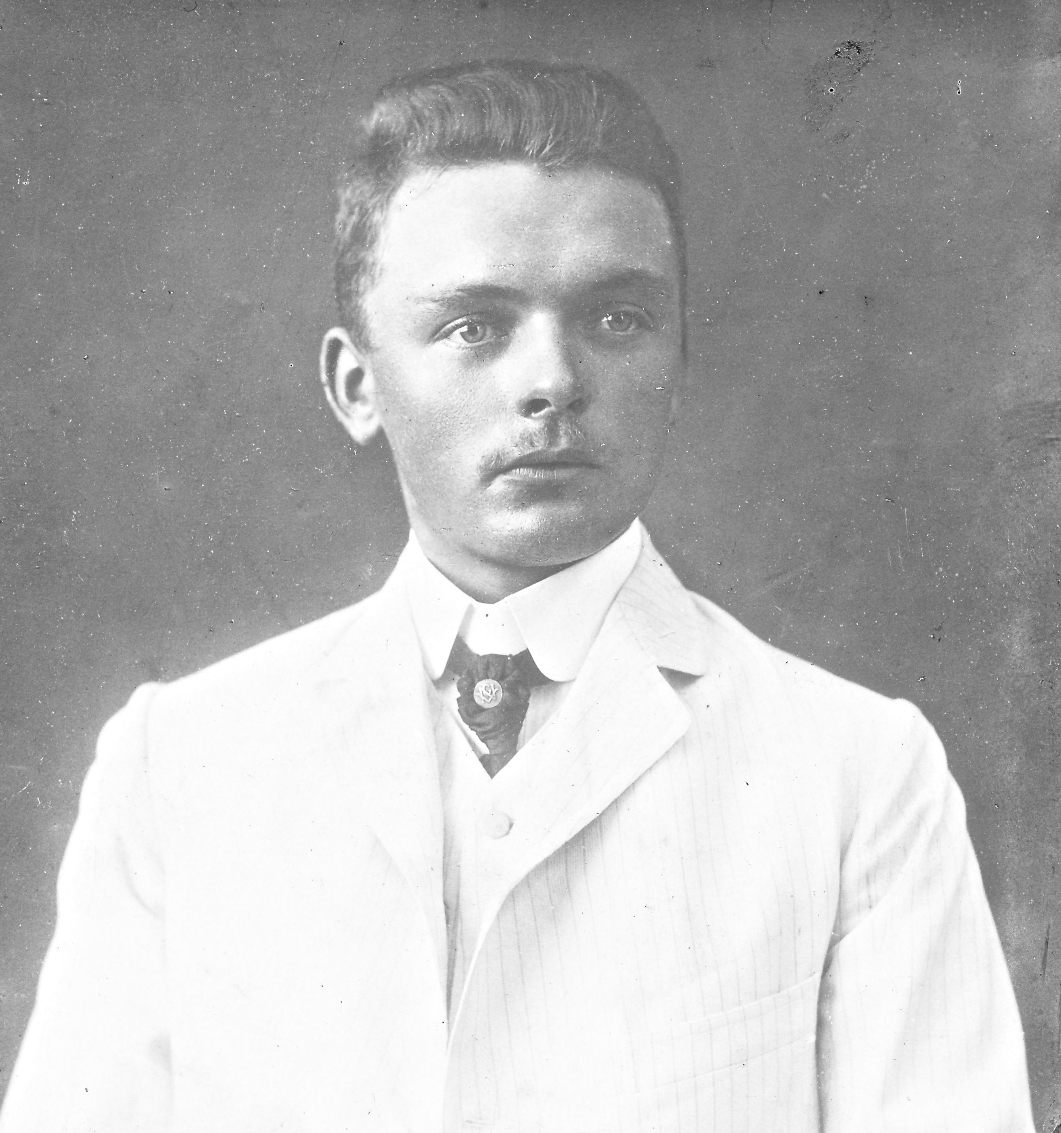 B.A. van der Sluijs, als administrateur op de tabaksonderneming op Deli (Sumatra).